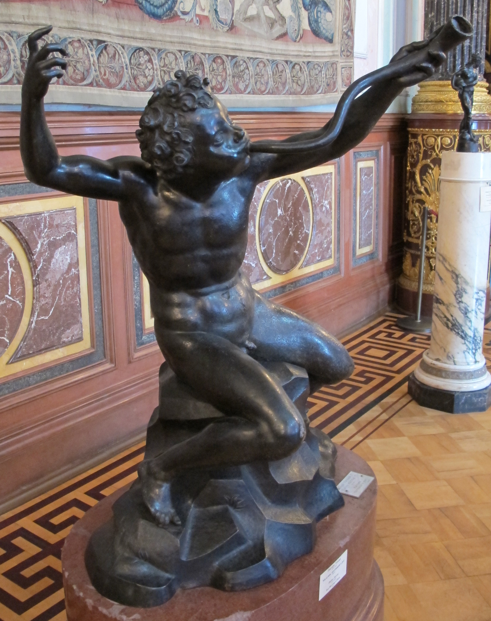 Pietro tacca, ragacco col corno